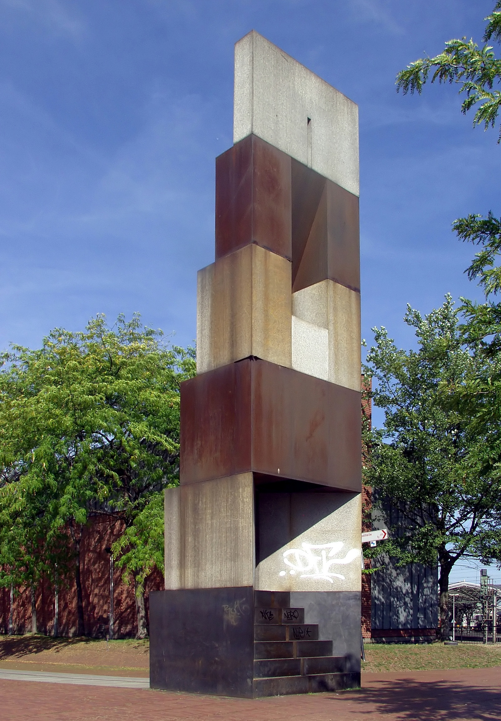 Environment für das Wallraf-Richartz-Museum und Museum Ludwig. Der Heinrich-Böll-Platz mit einer Gesamtfläche von 5000 m² ist ein Gesamtkunstwerk, bestehend aus Ziegelsteinen, Eisenbahnschienen, der Skulptur, Gras und Bäume.